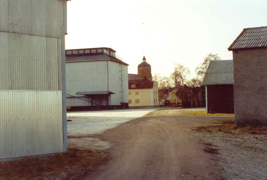 Skänninge 1997, ungefär här där bilden togs låg S:t Olofs kloster i Skänninge, nära hospitalet. En bild tagen av Harri Blomberg.